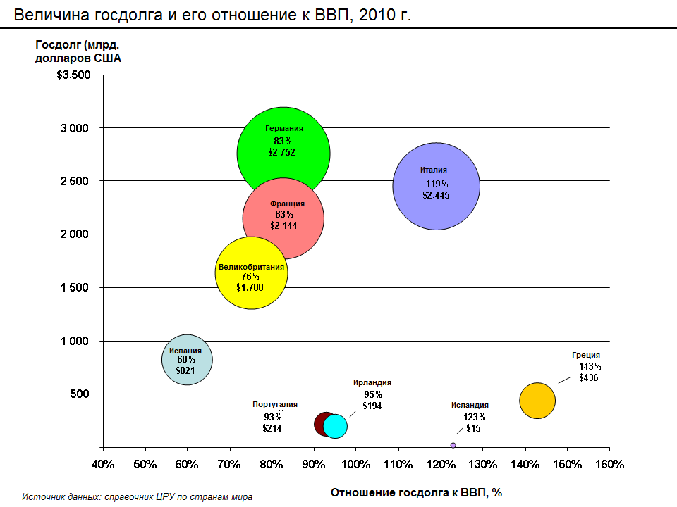 На графике отражены госдолг в долларах США ряда стран ЕС и его отношение к ВВП страны в процентах. Величина пузыря соответствует величине госдолга. Расчёт госдолга был проведён на основе данных справочника ЦРУ по странам мира (по официальному обменному курсу) как произведение ВВП страны и процентного соотношения госдолга и ВВП. Процентное отношение госдолга к ВВП приводится в справочнике ЦРУ. Величина ВВП приводится на 2010 г., величина госдолга - на июнь 2011 г. Способность страны выполнять обязательства по госдолгу зависит от финансового положения страны (т.е. темпов роста доходов, величины бюджетного дефицита и отношения объёма госдолга к ВВП), а также от темпов экономического роста и процентных ставок по кредитам. Кредитные рейтинги присваиваются странам рейтинговыми агентствами на основе ряда факторов. На данном графике отражается только государственный долг, т.е. долги правительства каждой страны. Внешний долг страны является суммой государственной и частной задолженности по отношению к заграничным инвесторам. В некоторых странах, представленных на графике, общая величина внешней задолженности значительно выше государственного долга. Способность частного сектора производить выплаты по внешним кредитам зависит, помимо прочего, от конкурентоспособности компаний, темпов экономического роста в стране, уровня безработицы.